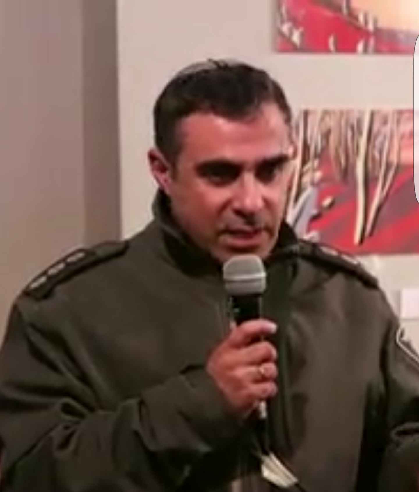 רן ישי הוא דיפלומט, לשעבר שגריר ישראל בקזחסטן, המשרת כיום כמנכ"ל משרד ירושלים ומורשת.